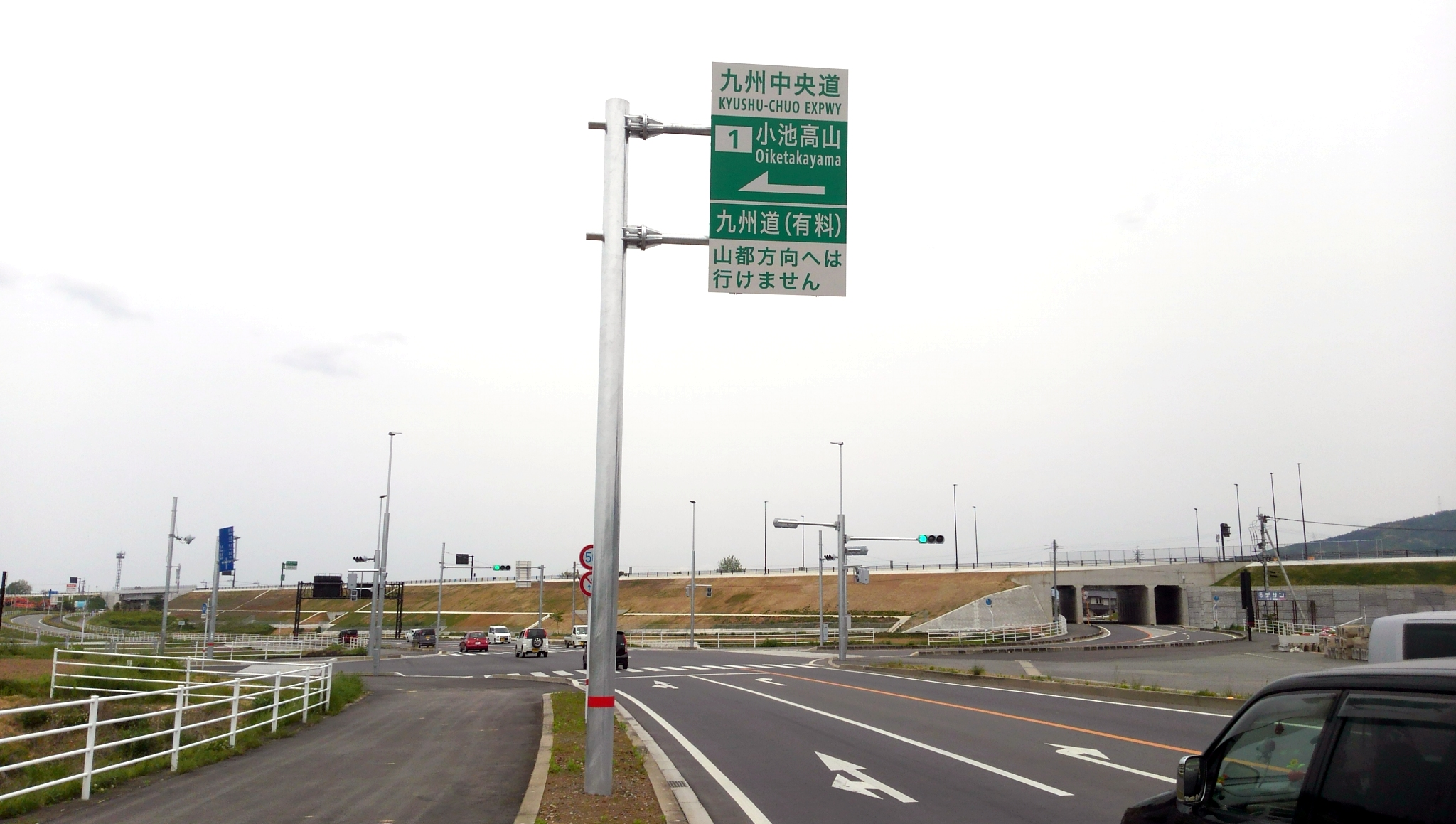 九州中央自動車道 小池高山インターチェンジ